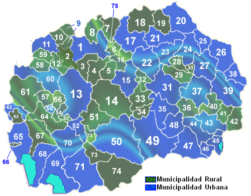 Mapa con las Municipalidades de la República de Macedonia.